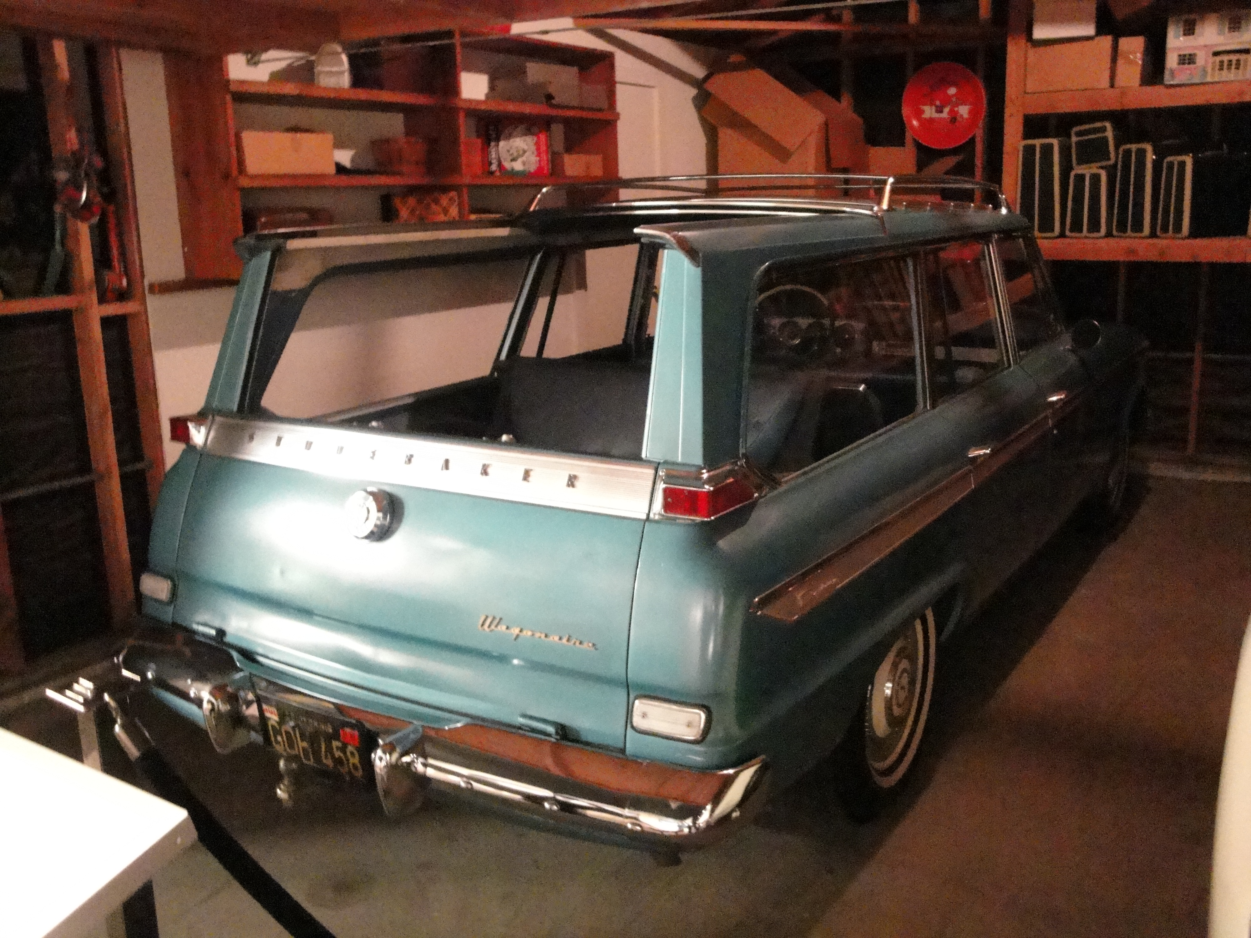 63 Studebaker Lark Daytona Wagonaire